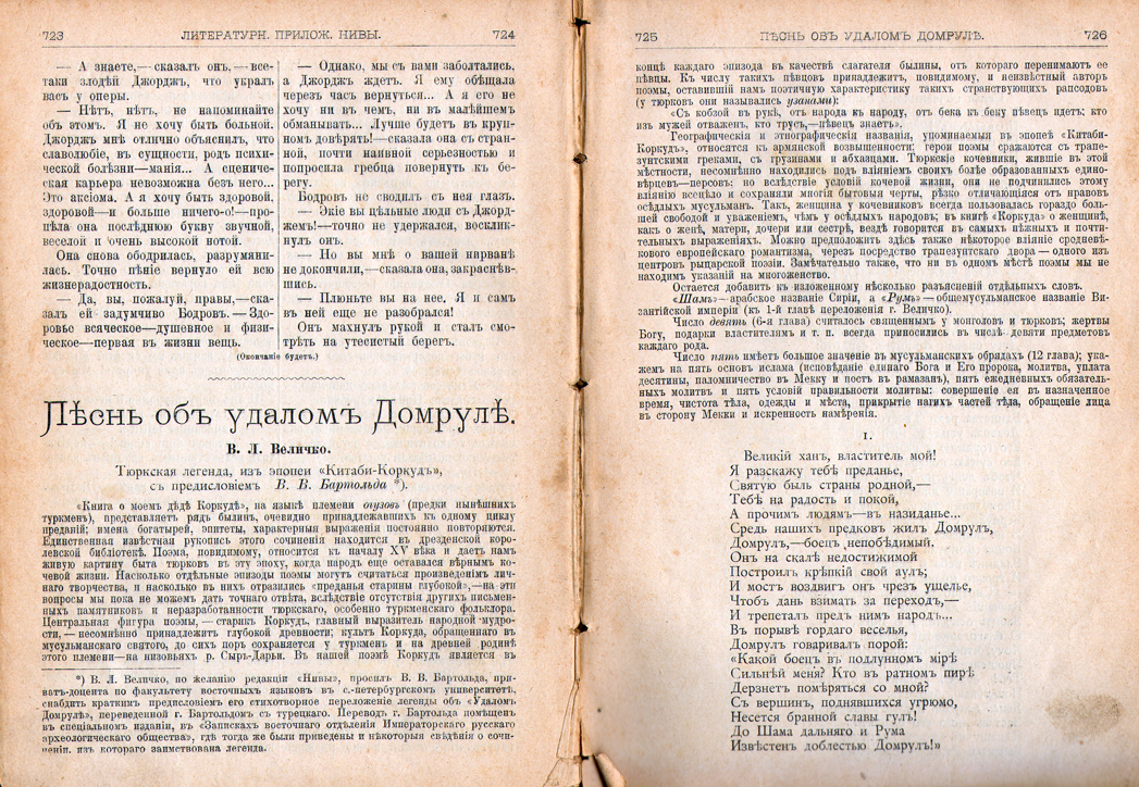 Стихотворение В. Л. Величко «Легенда о Домруле», приложение к «Ниве», 1897, апрель